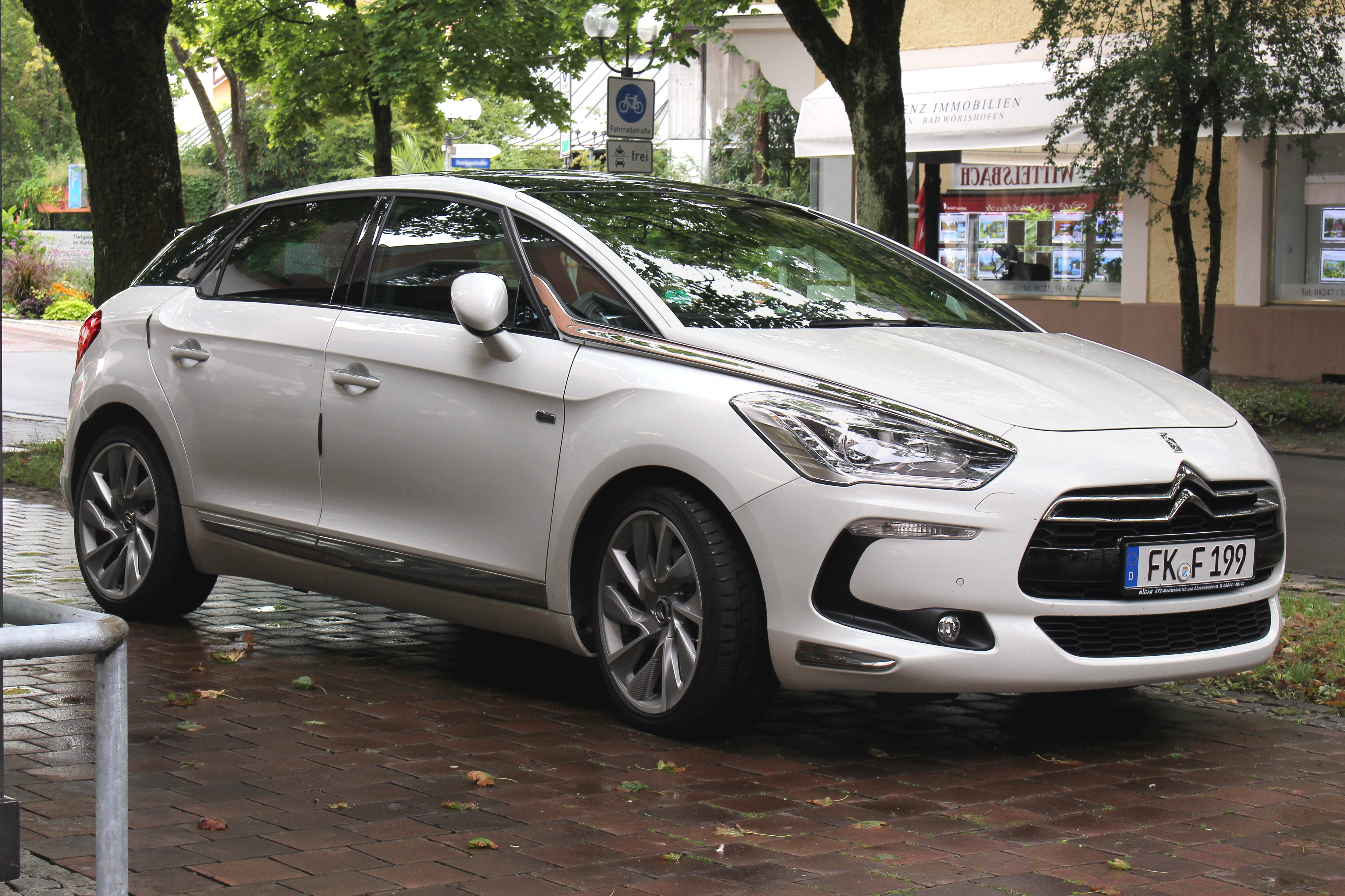 Citroën DS5, Baujahr 2013 (fiktives Kennzeichen)